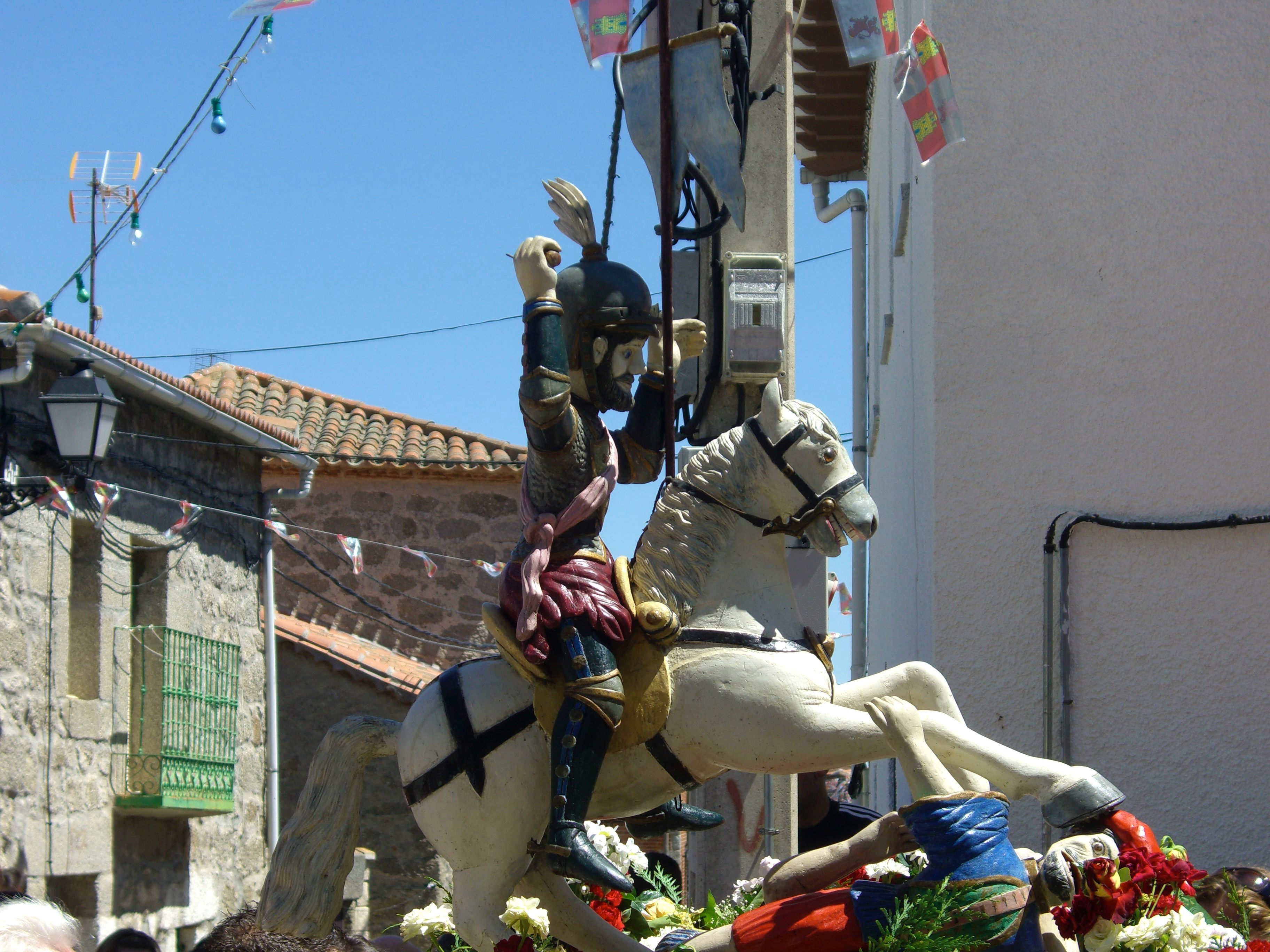 Procesión del Santo en las fiestas patronales del 25 de Julio , Santiago Apostol